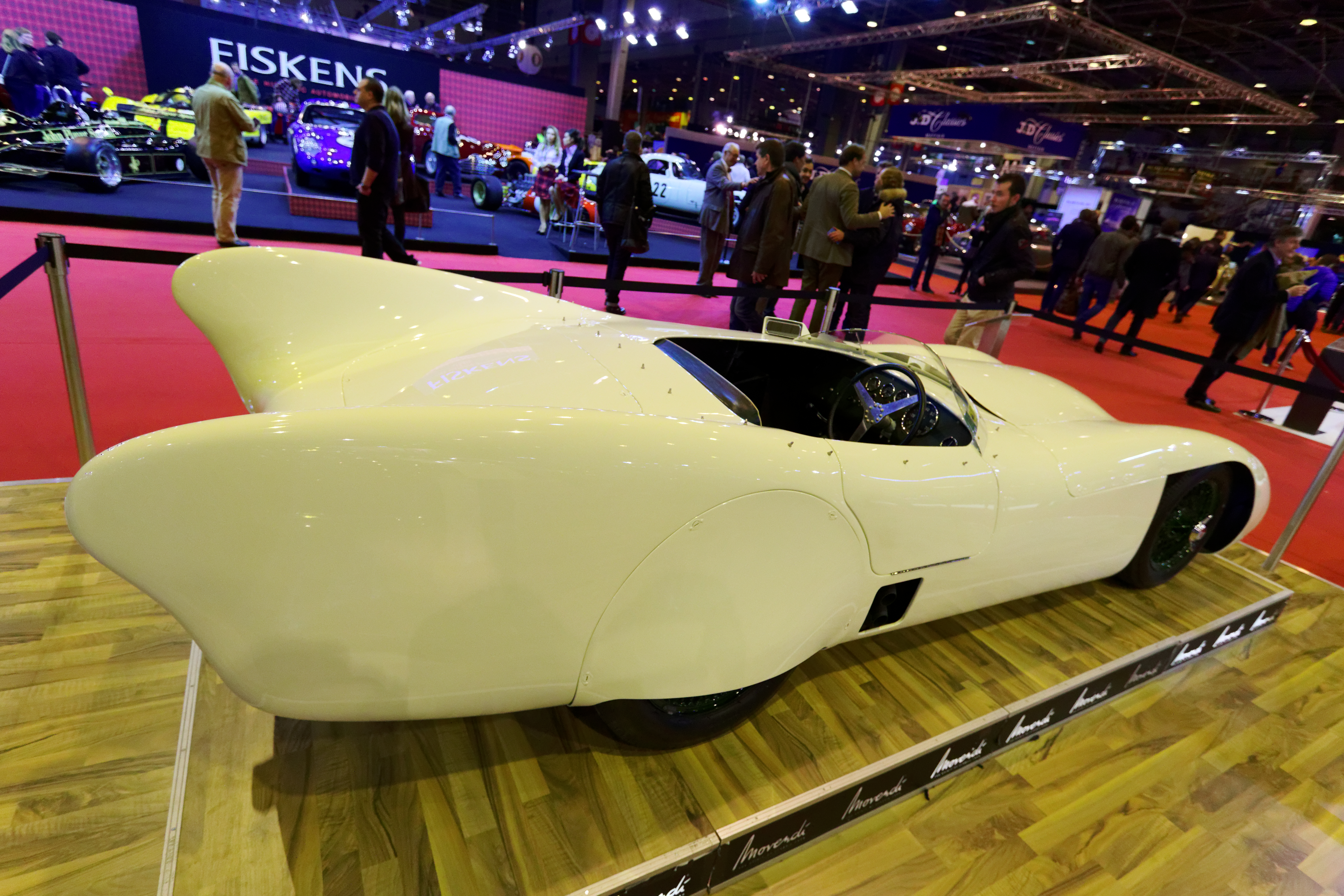 Une Lotus Mk VIII de 1955 exposée lors du salon Rétromobile 2016.